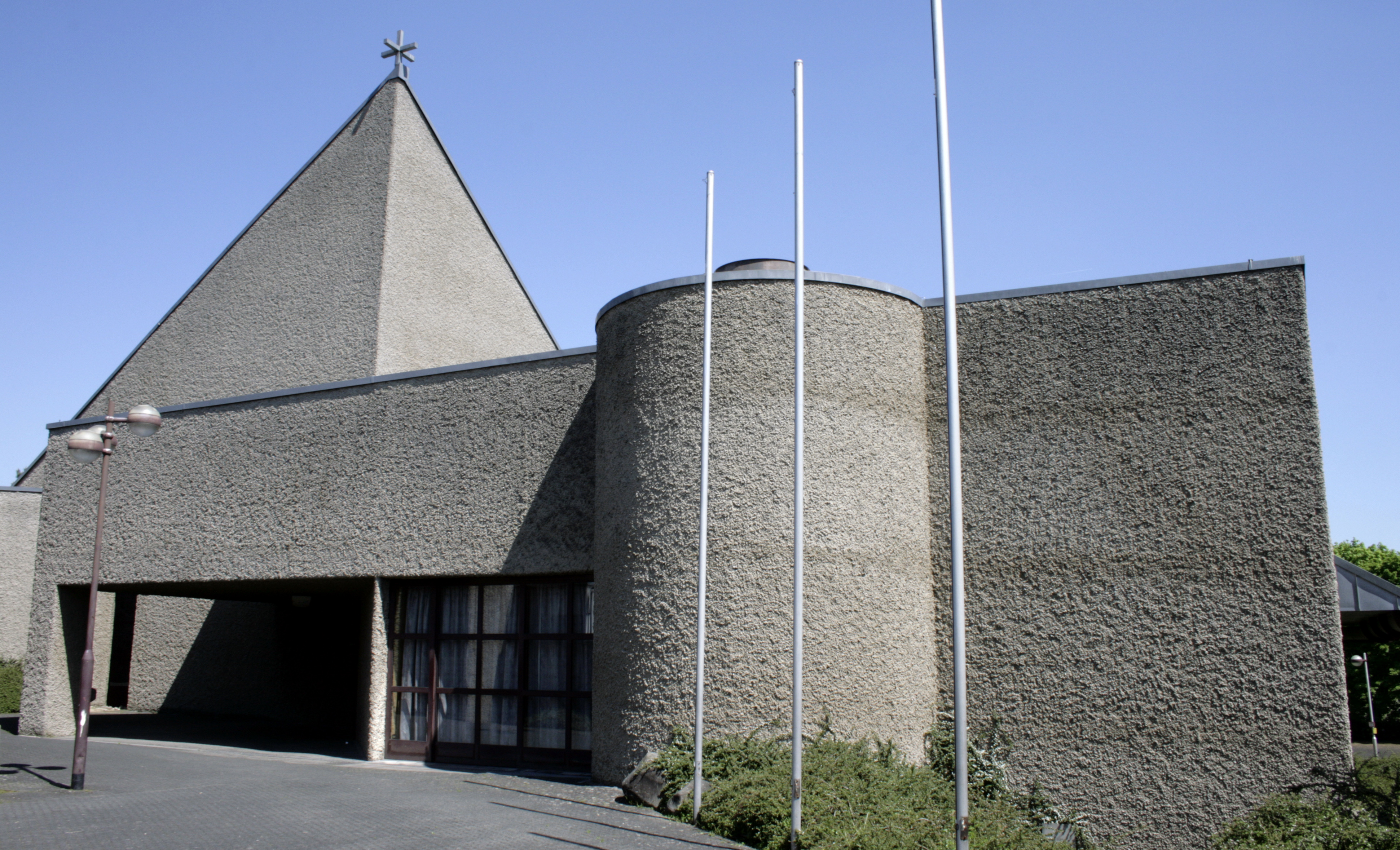 Neue Kirche in Lindenholzhausen, Deutschland